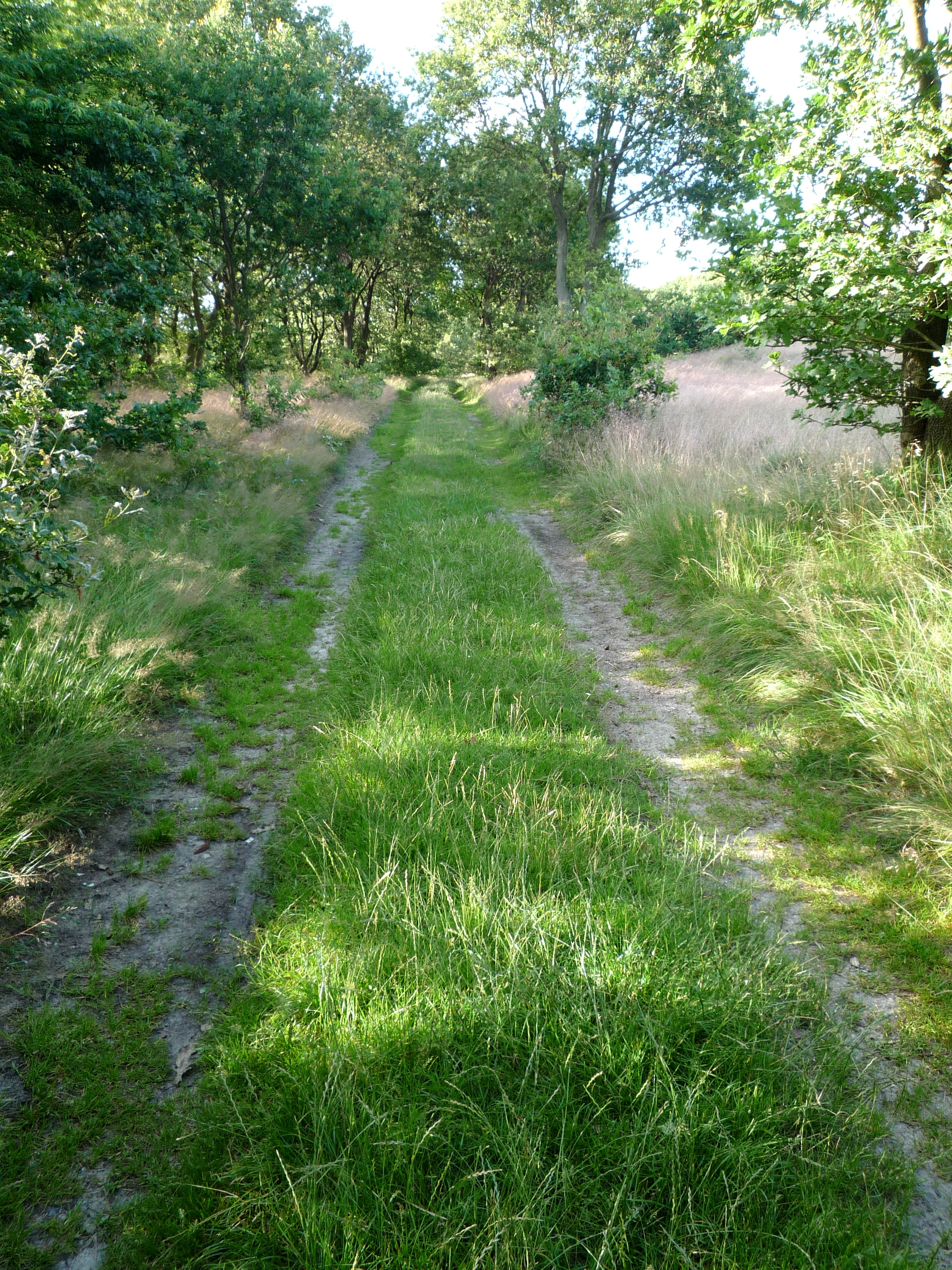 Reste des Ochsenweges; Abzweigung links auf der Straße von Lürschau nach Wilhelmslust